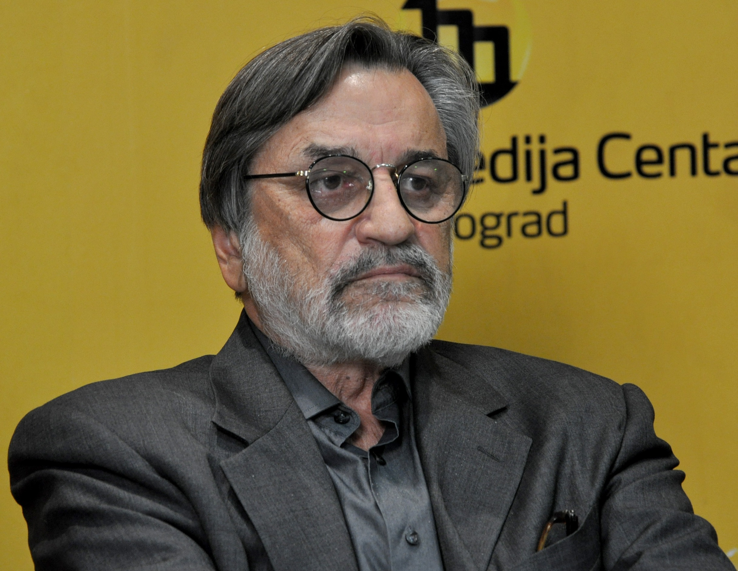 Драган Николић, српски глумац